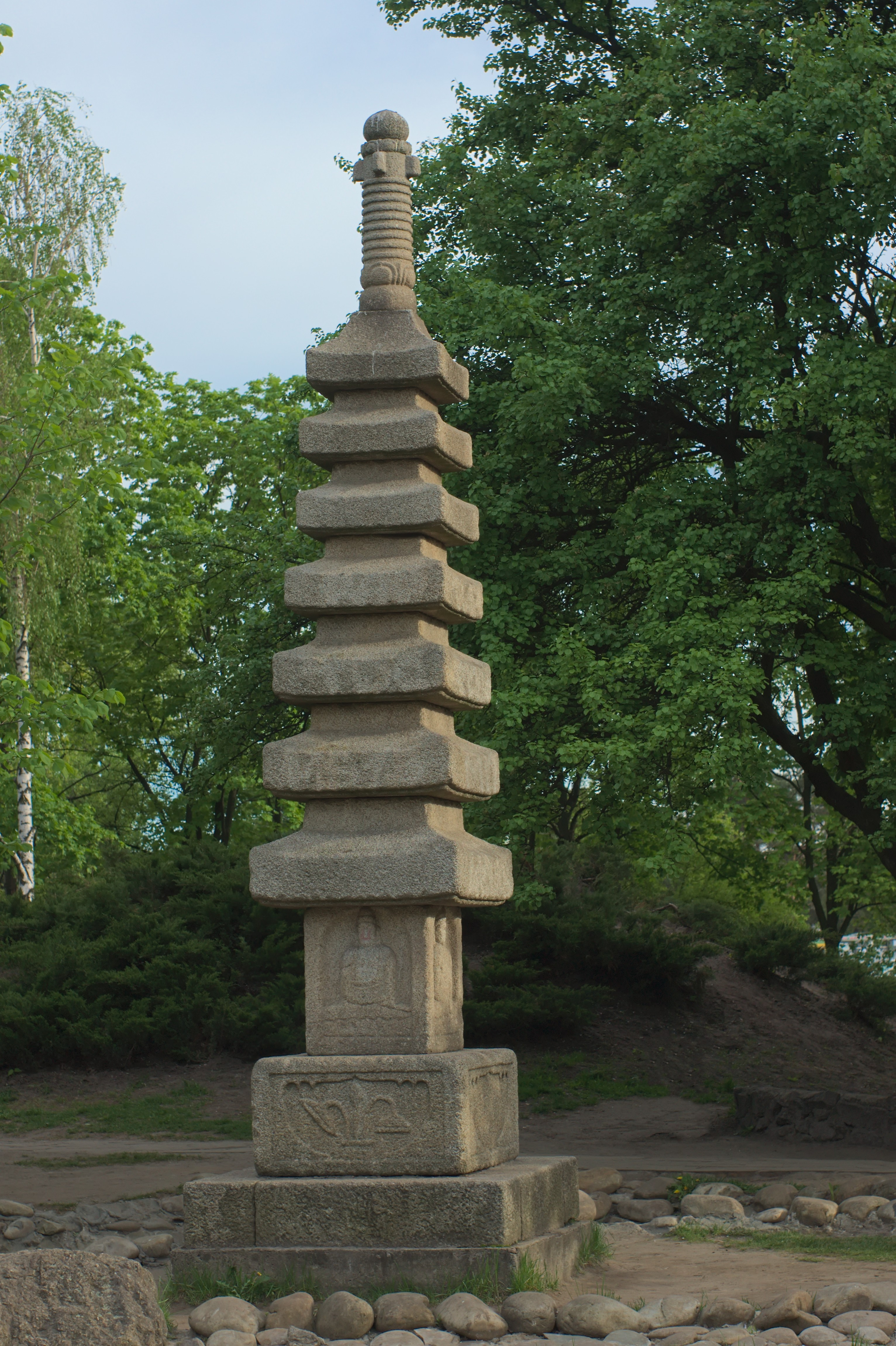 Киев, Украина 2016 Kyiv, Ukraine 2016 SMC Pentax M 50 1.4